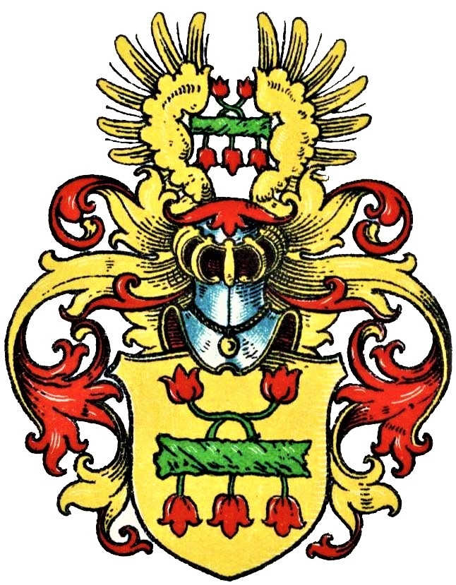 Wappen derer von Essen aus Arnsberg